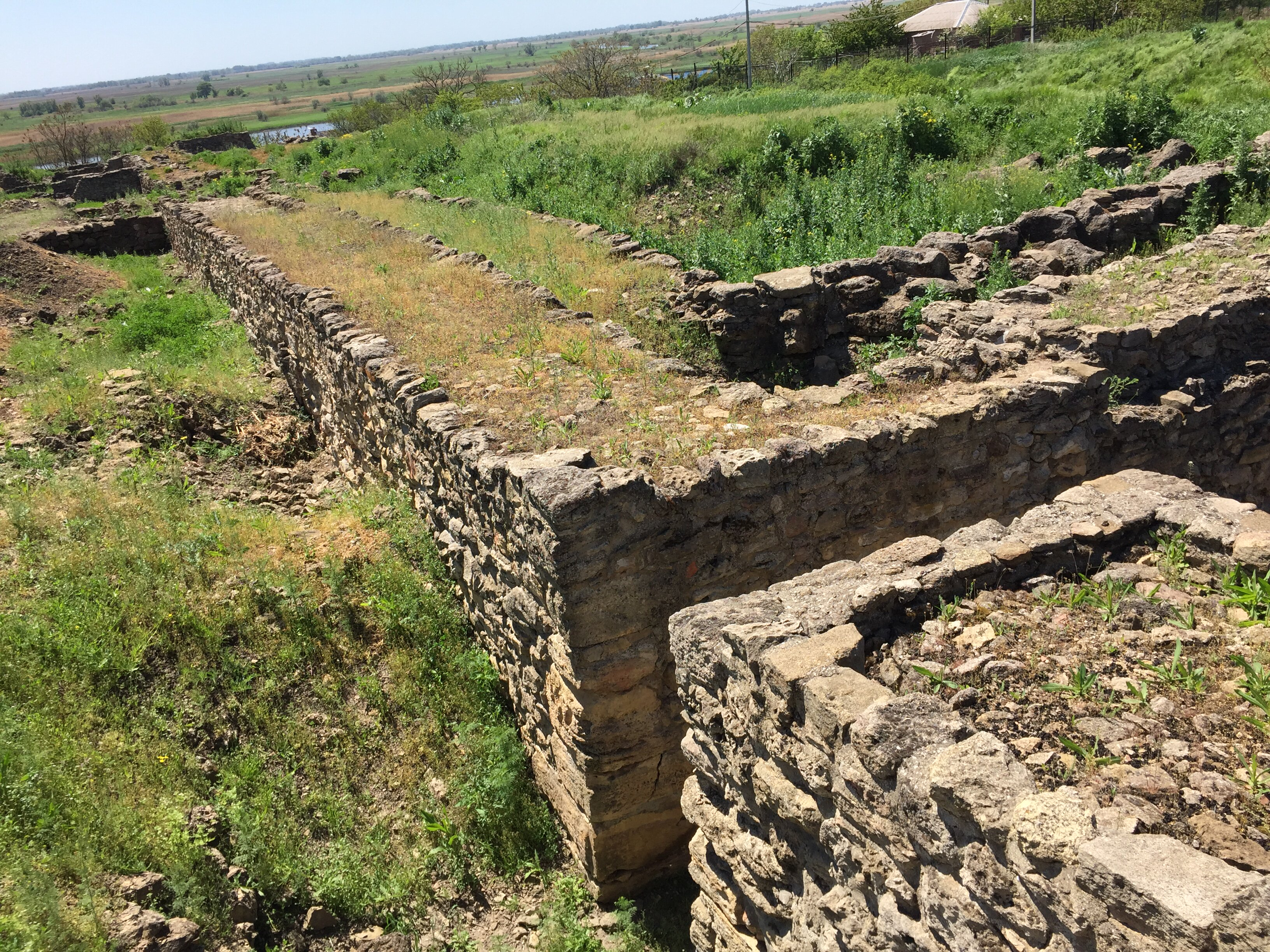 Танаис, археологический музей-заповедник: Недвиговка, Мясниковский район, Ростовская область This image is related to the protected area of Russia number 6100081